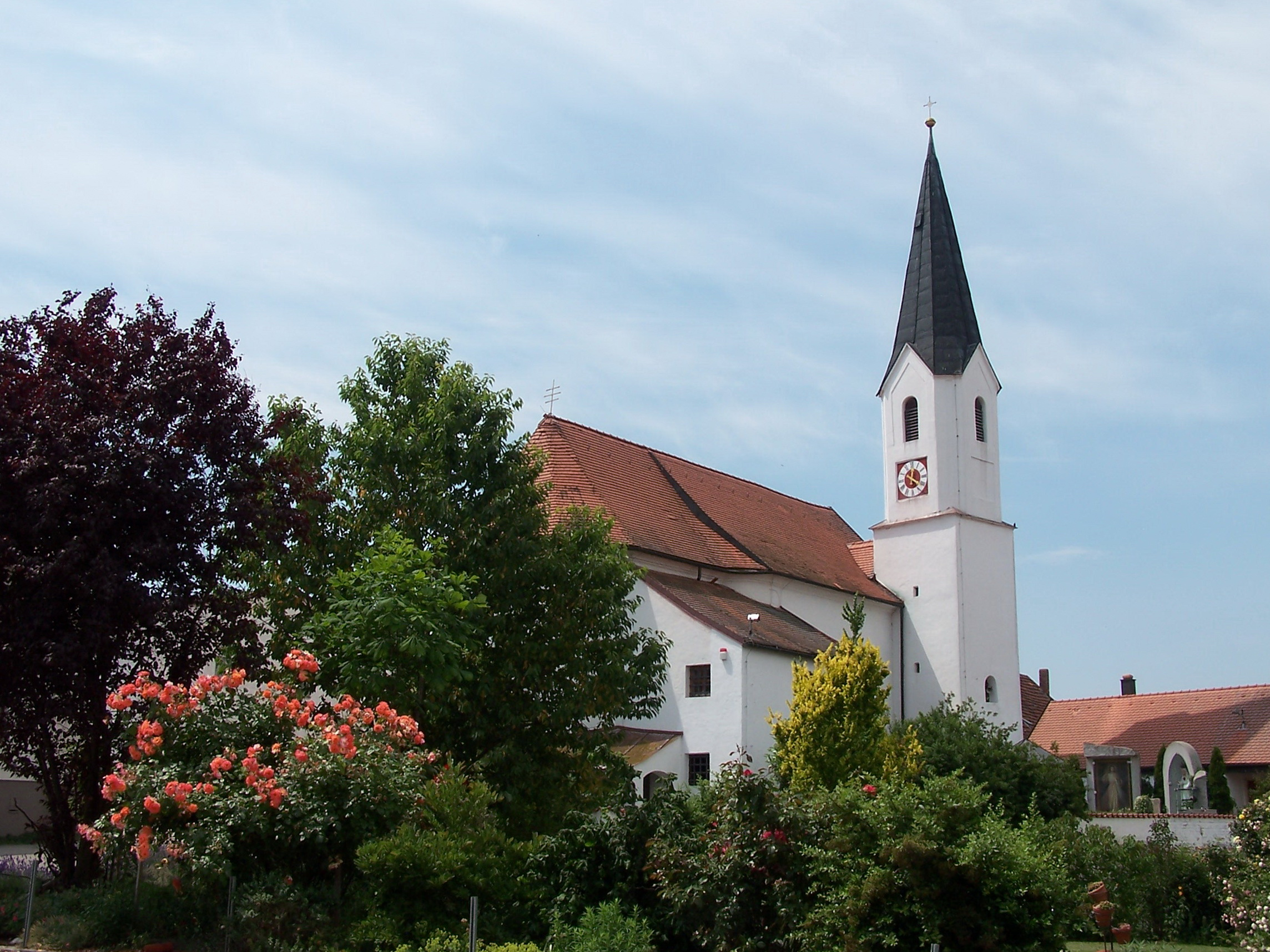 Marienwallfahrtskirche Haader - Patronzinium Pauli Bekehrung. Erbaut 1750, das Turmuntergeschoss spätgotisch, Oberteil um 1854; mit Ausstattung.